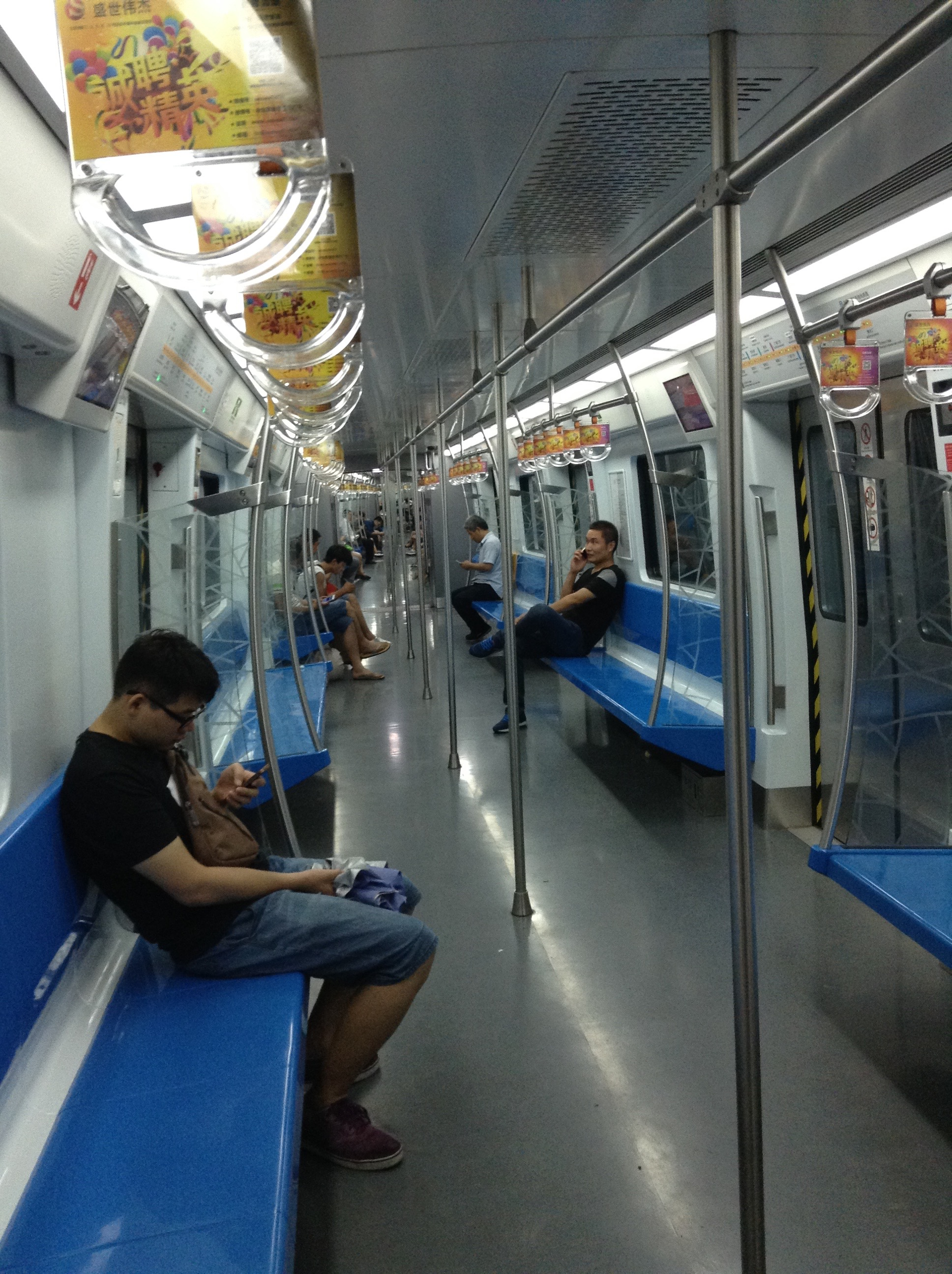 北京地铁7号线列车